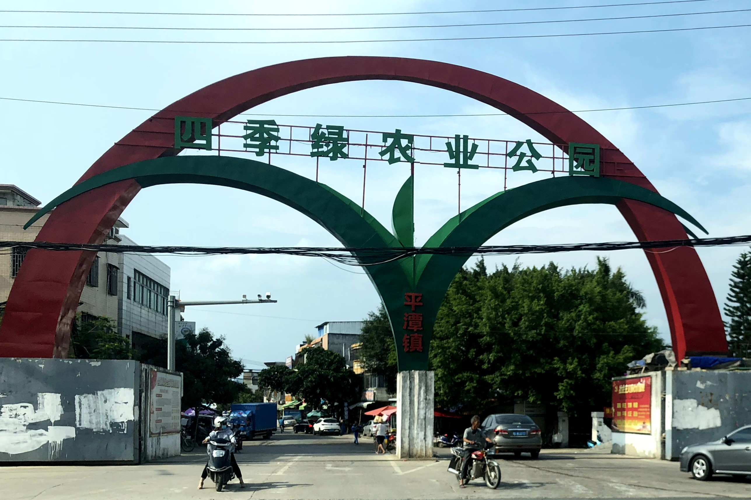 中文（中国大陆）: 平潭镇四季绿农业公园